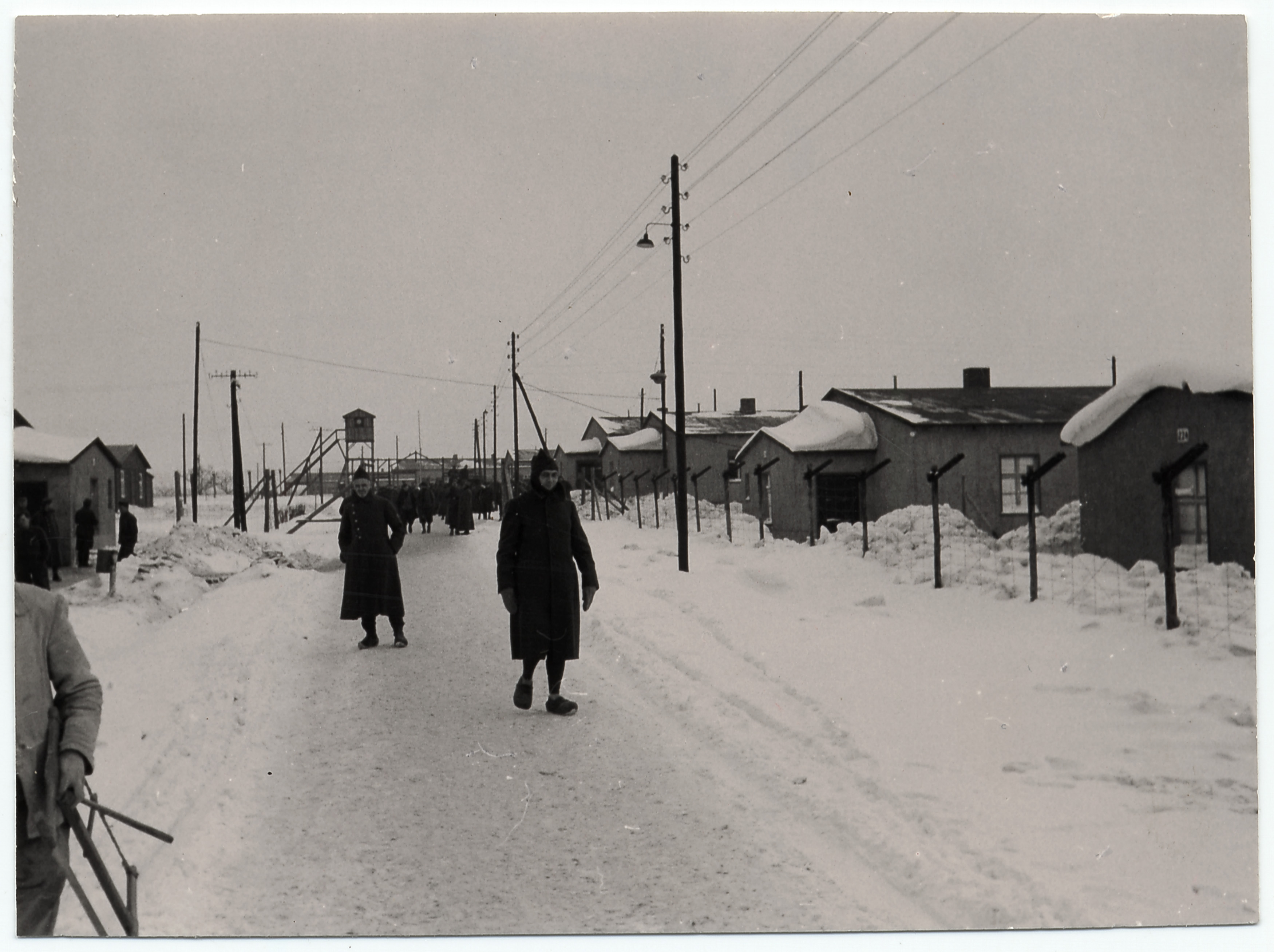 historisches Bild - Impression aus dem Stalag VIII A